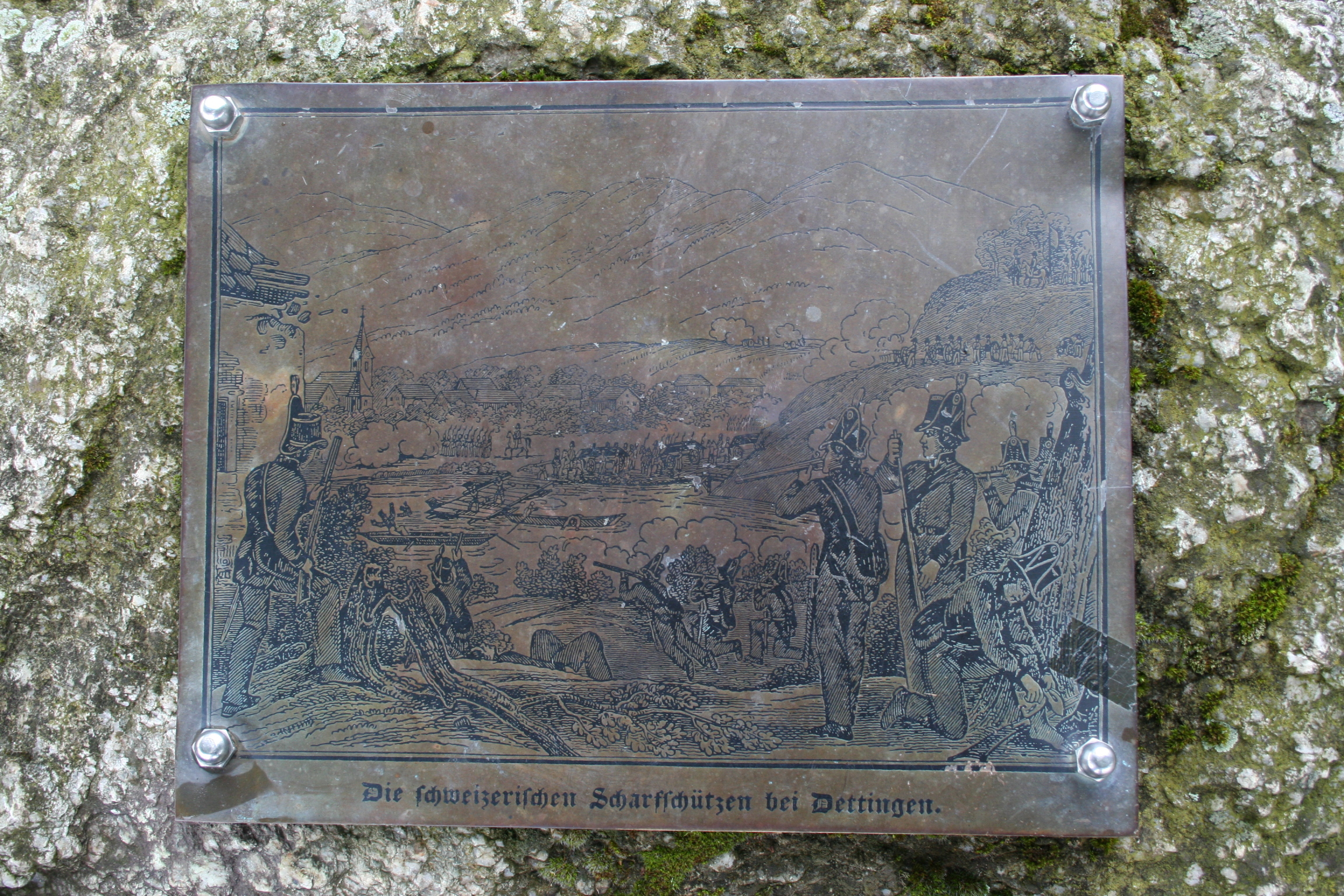 Denkmal Die Schweizerischen Scharfschützen in Döttingen Zum Gedenken An die Schlacht zwischen Oesterreichern und Franzosen im August 1799